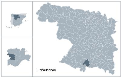 Localización del municipio de Peñausende en la provincia de Zamora, en la comunidad autónoma de Castilla y León y en España.